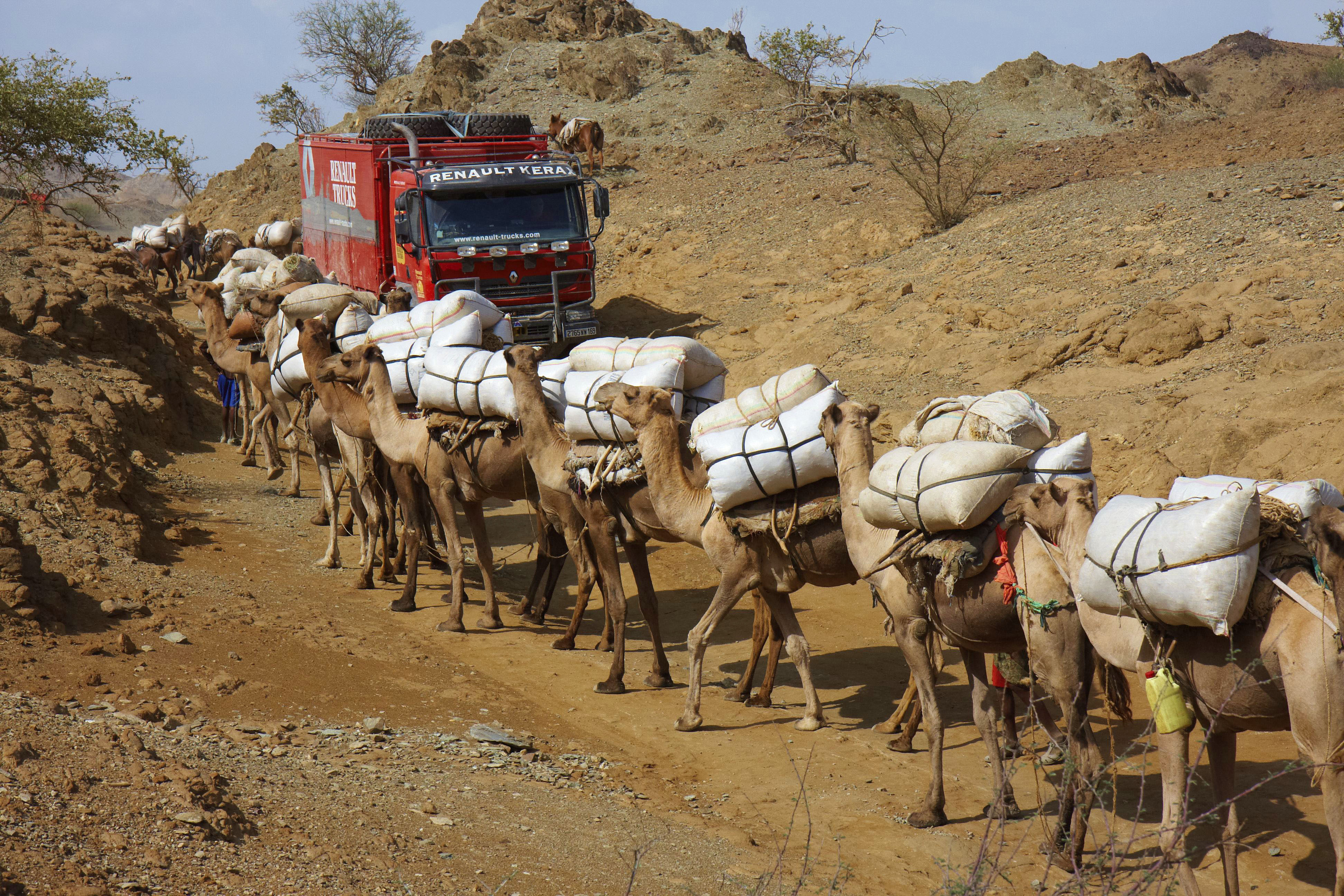 Dans un village en Ethiopie, chameaux transportant des sacs This is an image with the theme "Africa on the Move or Transport" from: Ethiopia